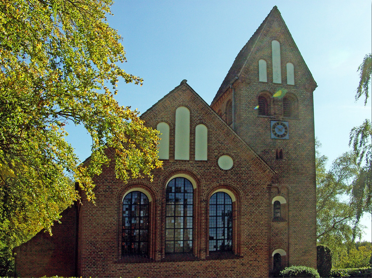 fra vest